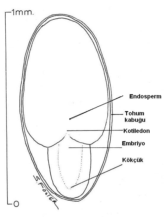 Türkçeye çevrilmiştir. Orjinali